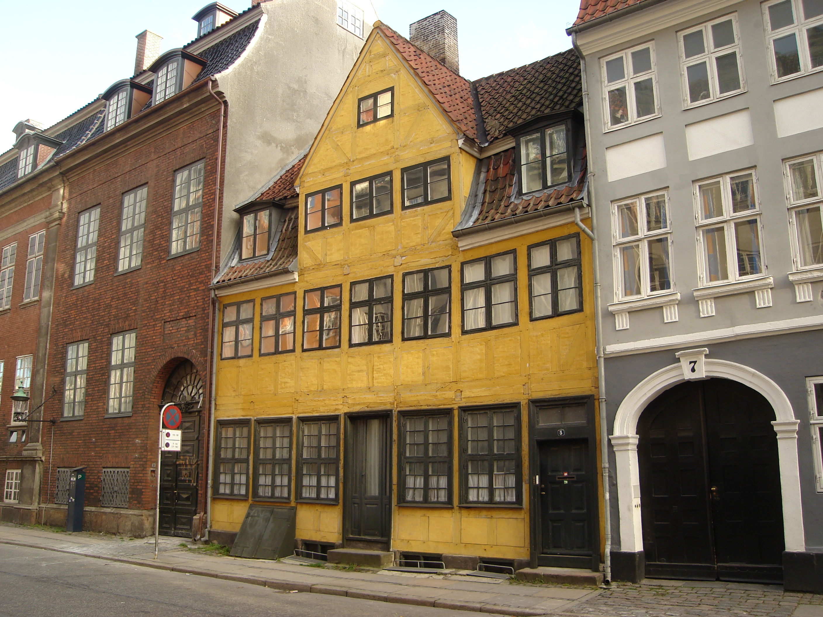 Ny Kongensgade 5 in Copenhagen, Denmark